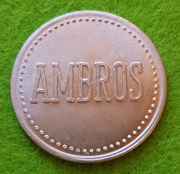 Biermarke Rückseite - AMBROS Brauerei